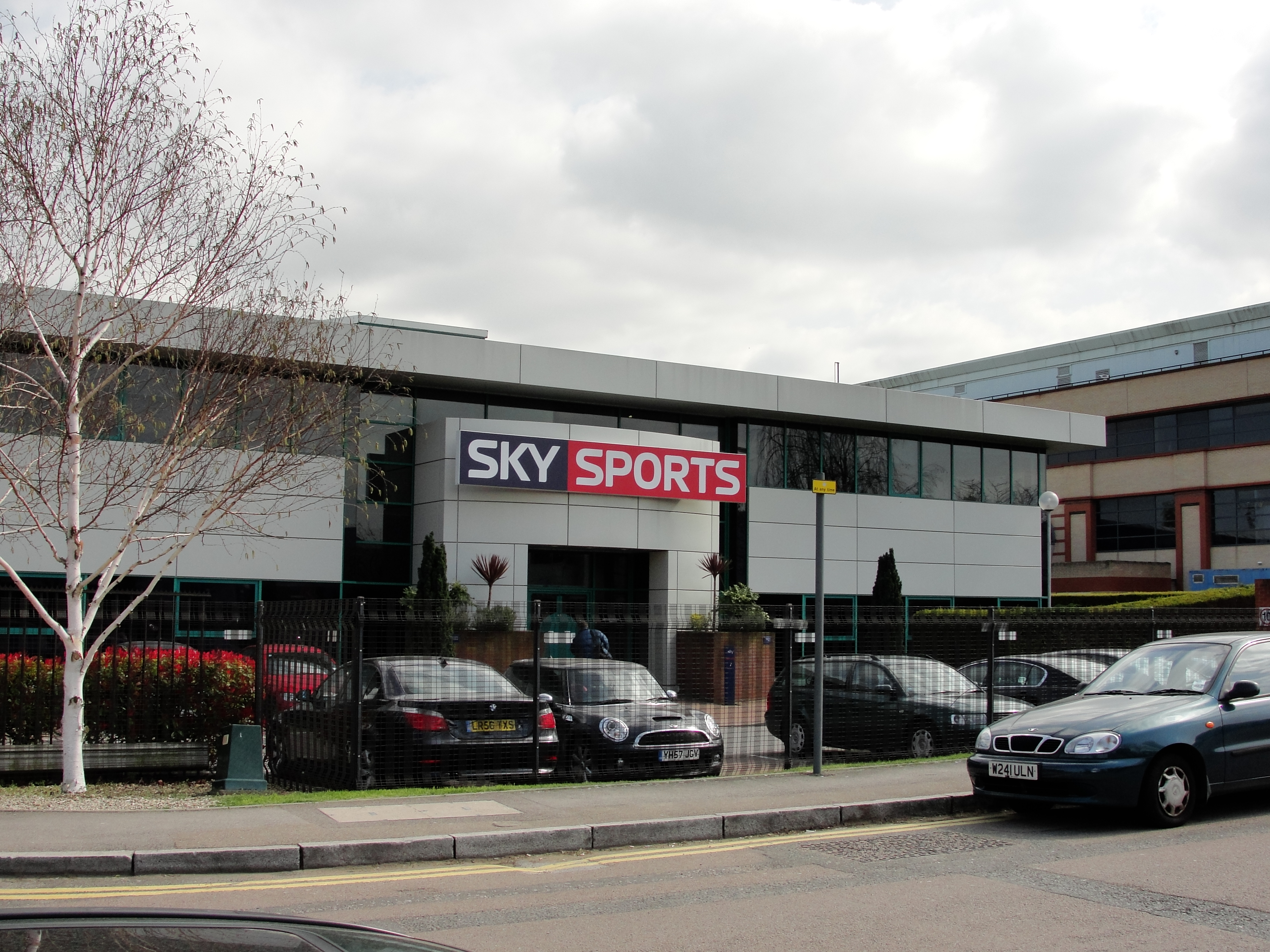 Sky Sports TV in Brentford